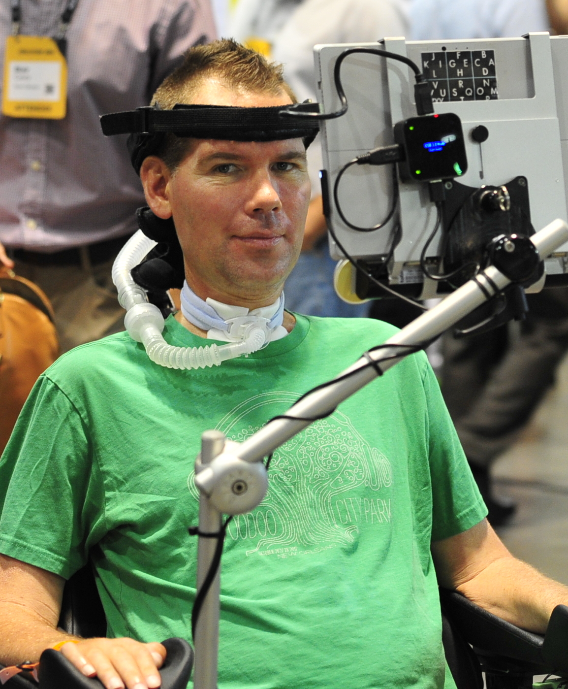 _DSC1059